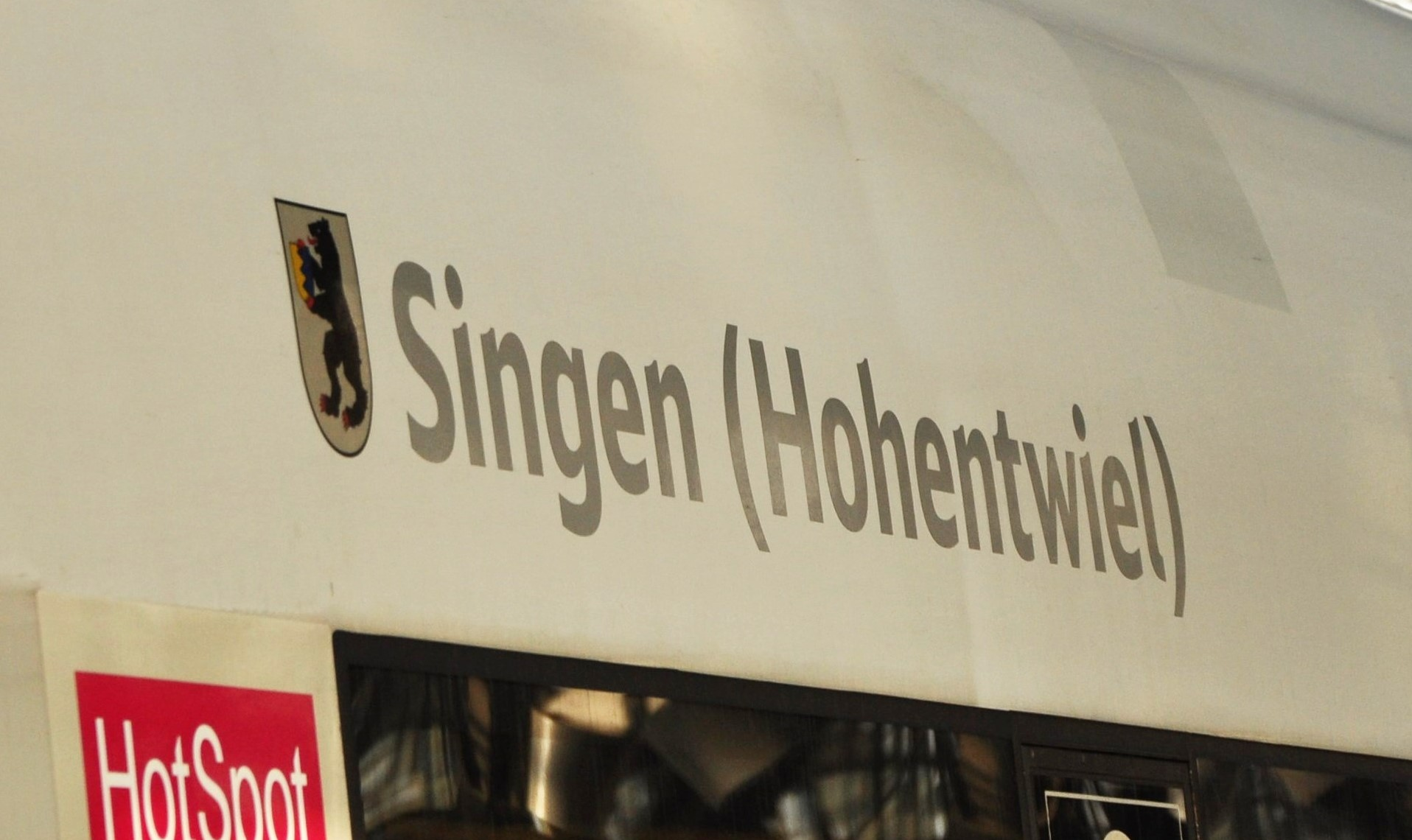 Die Deutsche Bahn versieht ihre ICE-Züge mit Taufnamen deutscher und europäischer Städte.